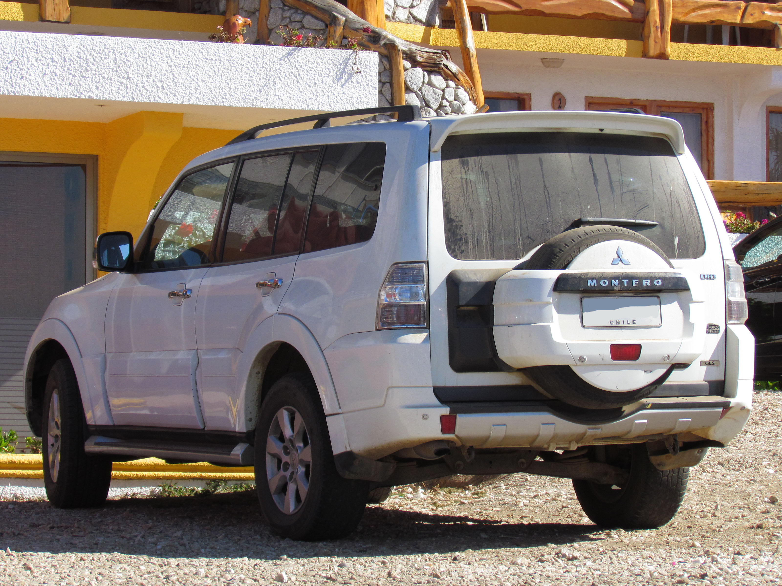 Mitsubishi Montero GLS 3.2 Di-D 2012